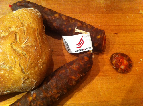 El Chorizo de León con Marca de Garantía donde se aprecian sus colores y su corte.